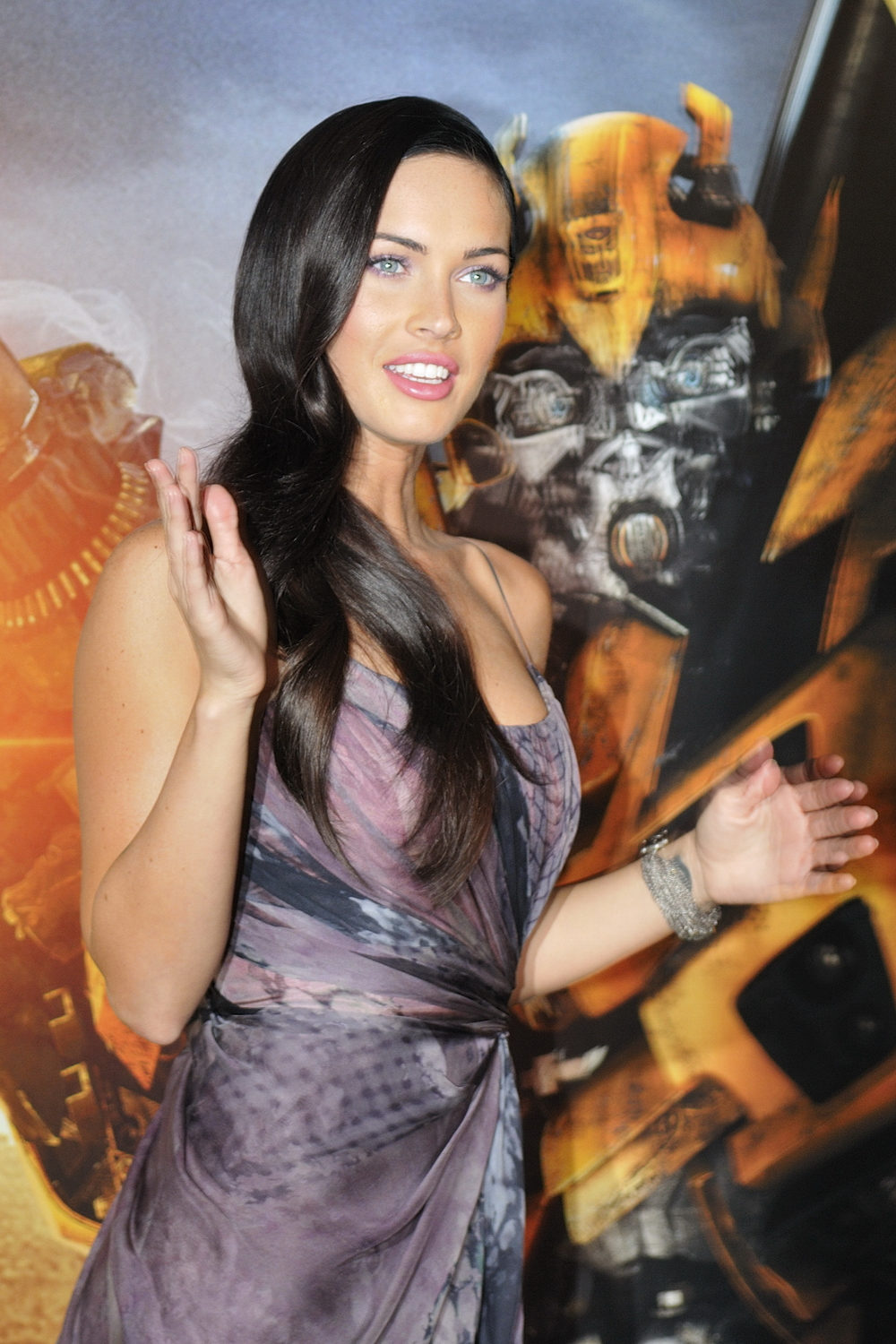 Megan Fox et Shia Labeouf au Georges V à Paris, pour la promo du film Transformers 2 : la revanche